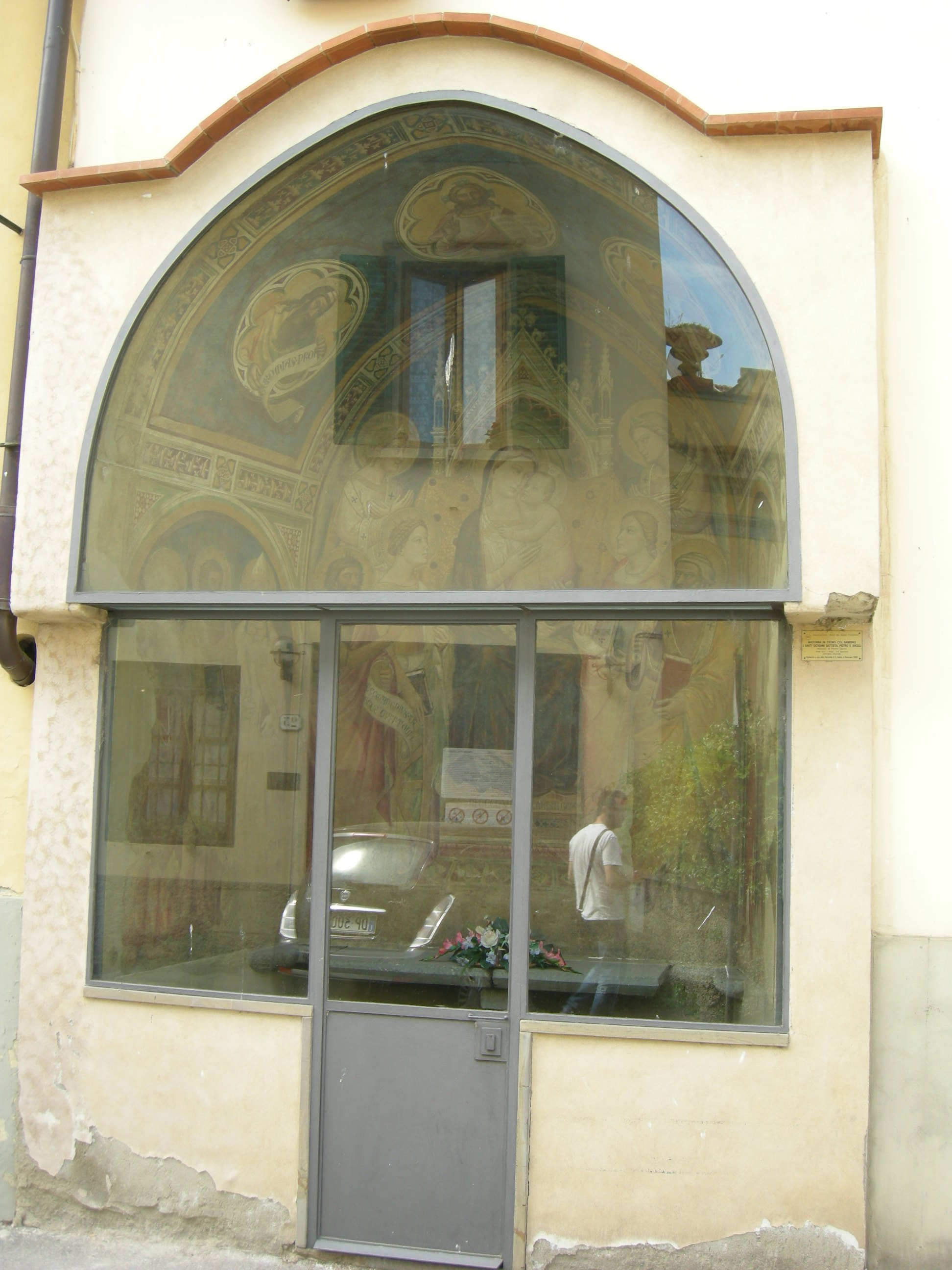 Rovezzano, tabernacolo di niccolò di pietro gerini